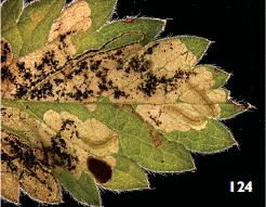 Ectoedemia agrimoniae larva